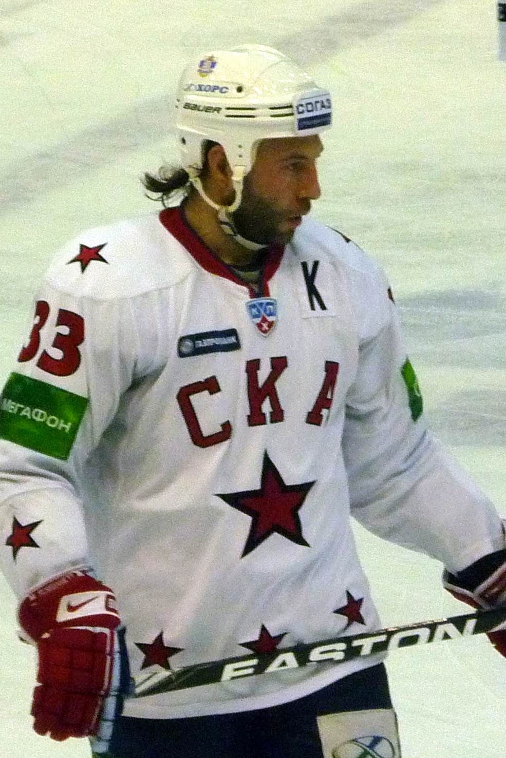 Нападающий и капитан питерского СКА Максим Сушинский в матче против нижегородского «Торпедо» 12 декабря 2010 года